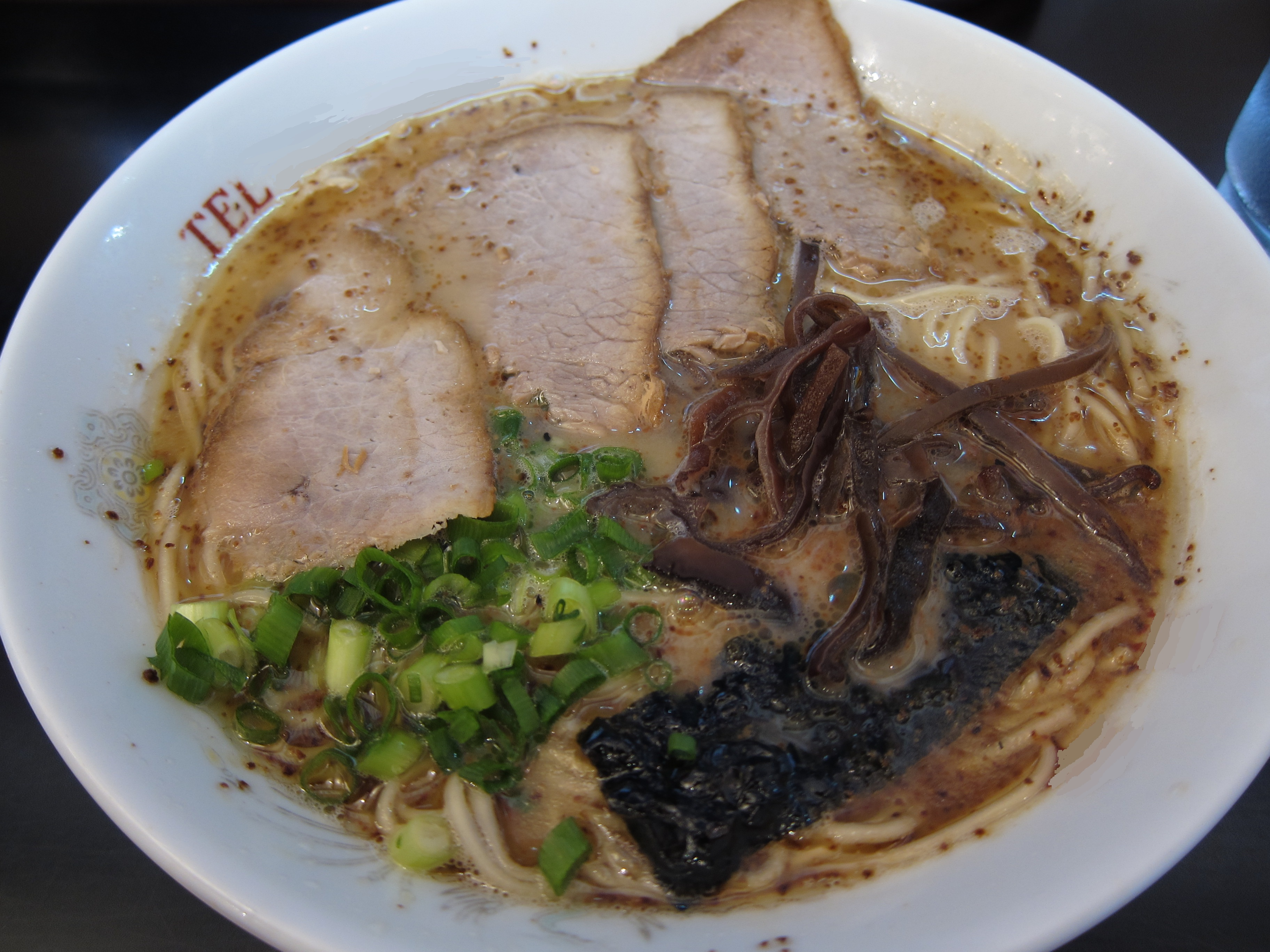 熊本の典型的なラーメンの画像です。宣伝にならないよう電話番号と屋号は消してあります。